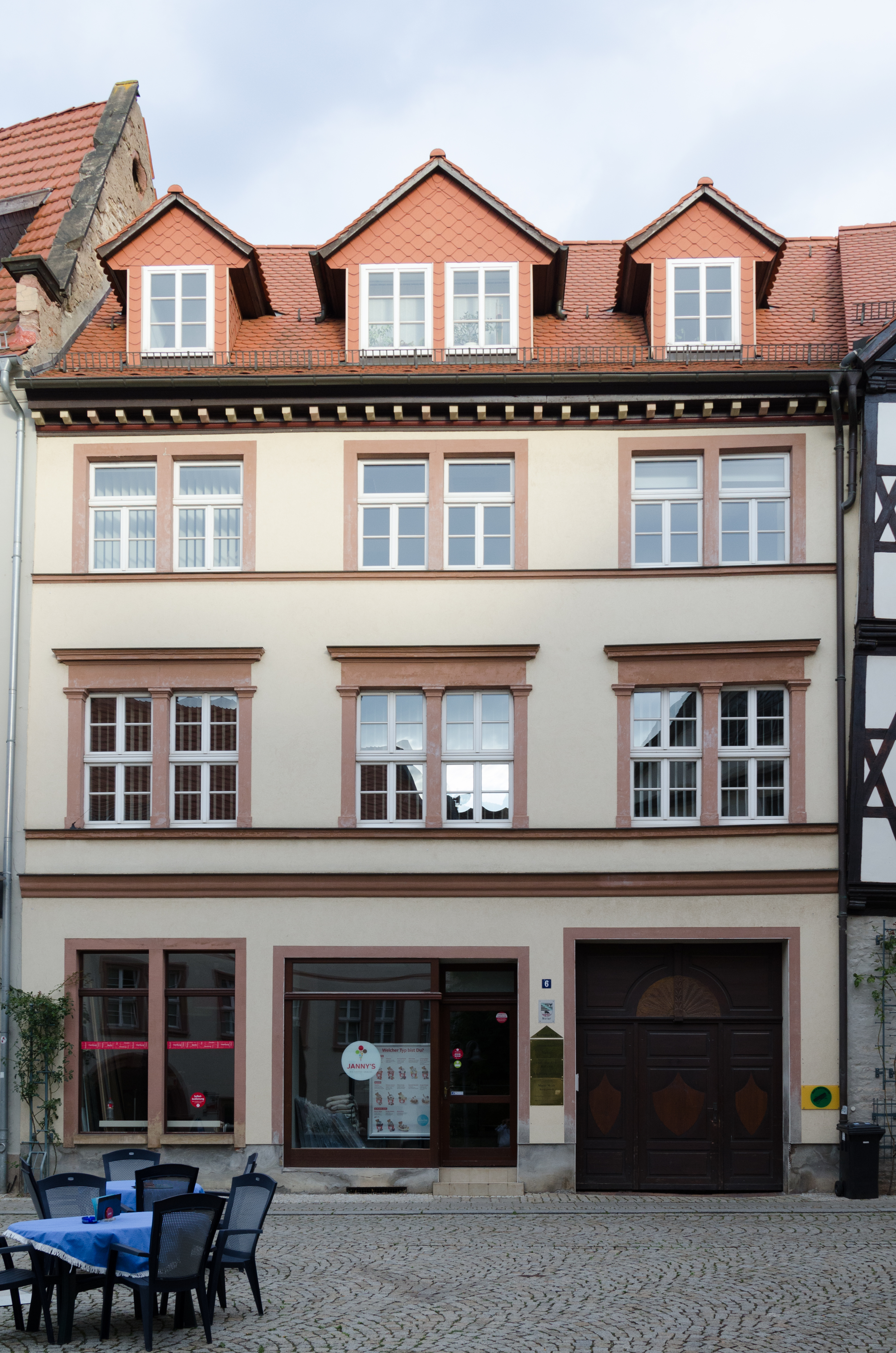 Sangerhausen, Kornmarkt 6